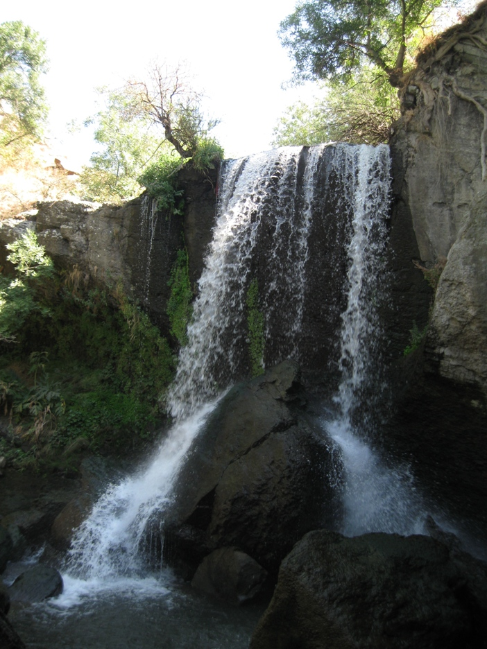 Խոսրովի անտառ, Ազատ գետի ջրվեջներից